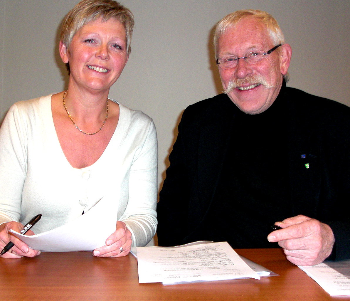 Partnerskapsavtale om regionale fond 2009. Daværende fylkesråd Susanne Bratli og Frosta-ordfører Lars Myraune.